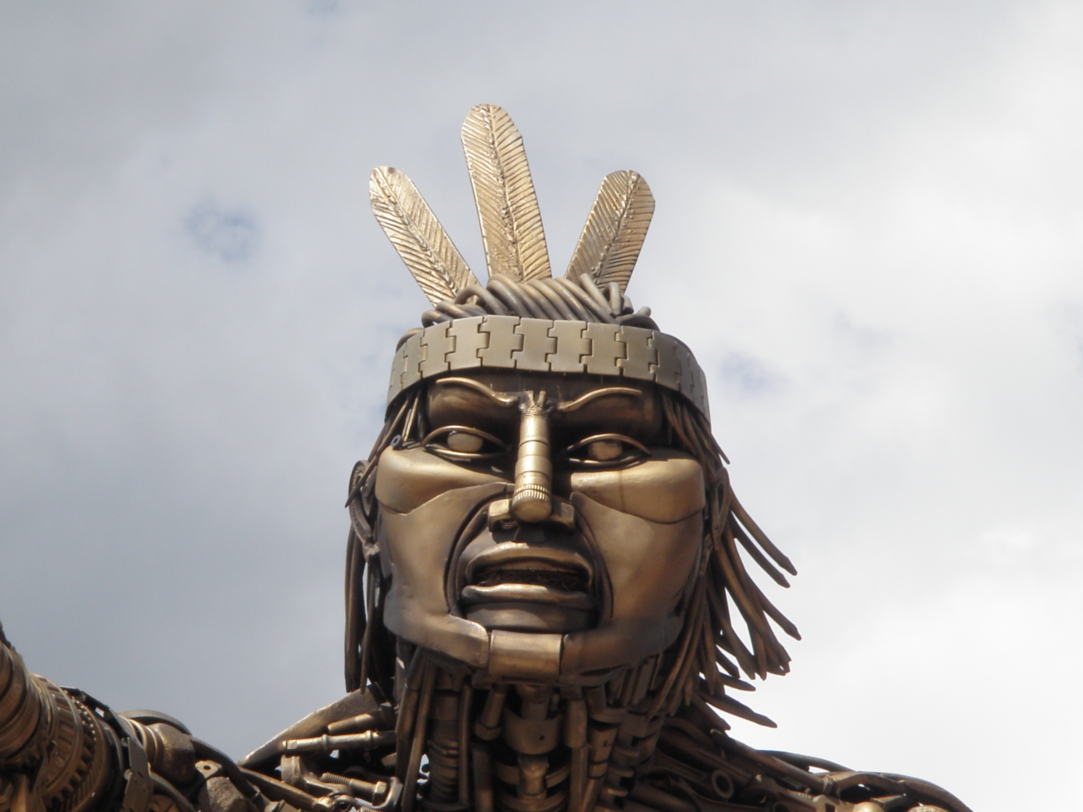 Sector Urbano del Municipio de Turmequé